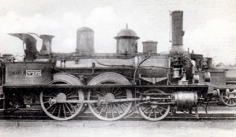 Locomotive Midi n° 232 à Bordeaux Saint-Jean.